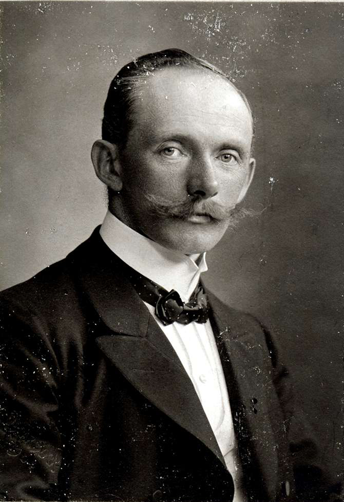 Josef Gustav Duffner (1. Oktober 1868 in Furtwangen; 26. Juni 1935 ebenda) Gutsbesitzer, badischer Landtagspräsident und Mitglied des Deutschen Reichstags (Zentrum).